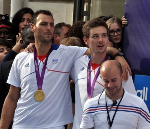 Jérôme Fernandes et Xavier Barachet au défilé des médaillés français des J0 2012